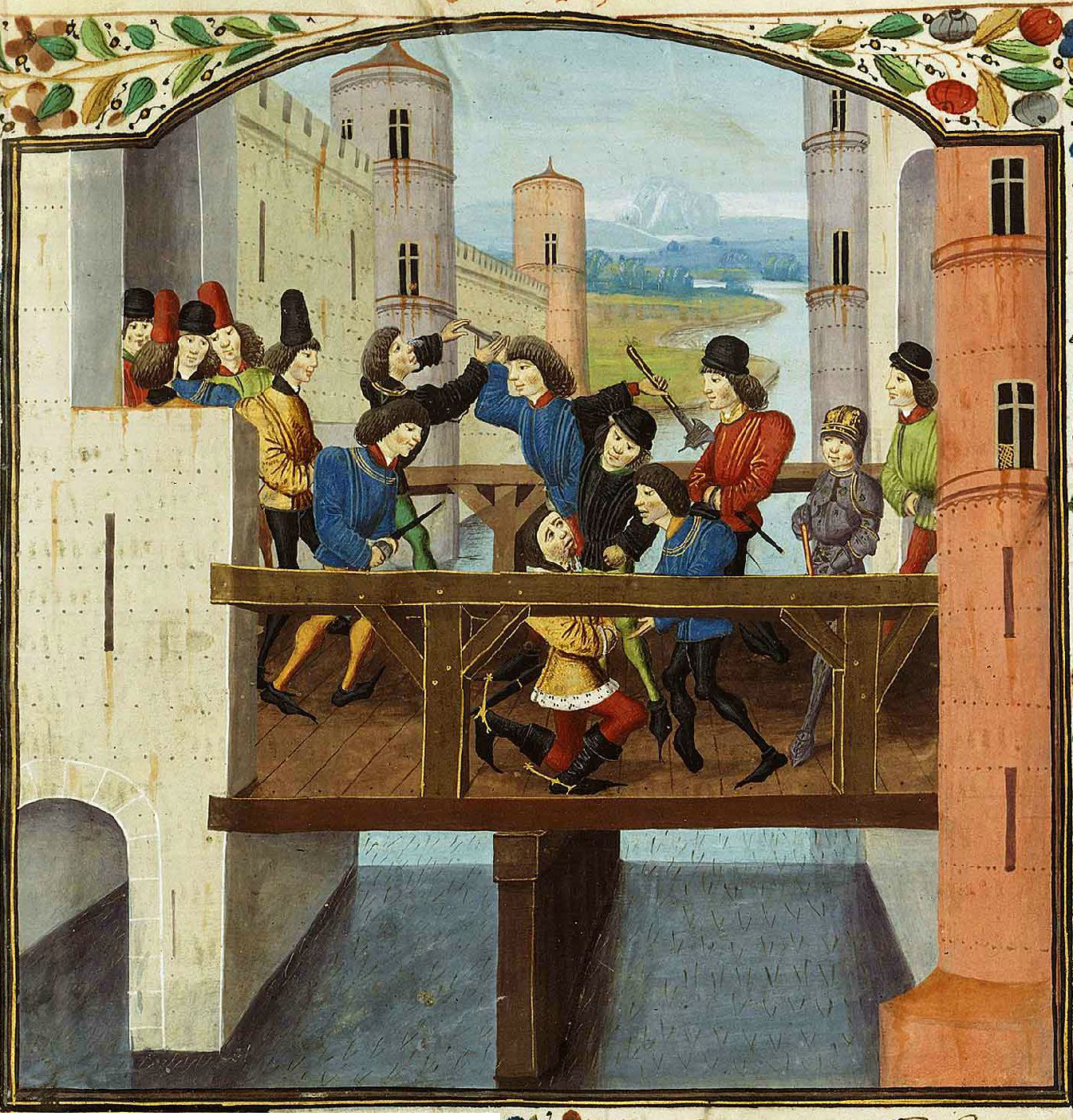 Assassinat de Jean sans Peur au Pont de Montereau. Abrégé de la Chronique d'Enguerrand de Monstrelet. Maître de la Chronique d’Angleterre, enlumineur. Bruges, vers 1470-1480. Provenance : Louis de Gruuthuse. Paris, BNF, Mss, fr. 2680, f. 288